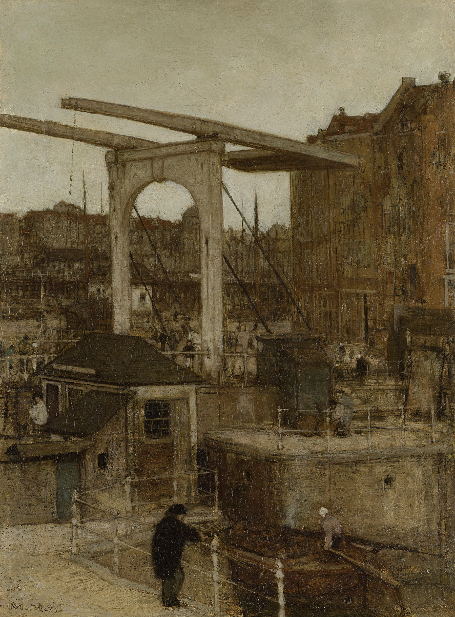 Voorstelling van de Nieuwe Haarlemse Sluis bij het Singel te Amsterdam, genaamd 'Souvenir d'Amsterdam'. Een boot vaart door de sluis, aan de balie kijkt een man naar beneden. Geschilderd in Parijs naar een stereofoto.; Matthijs Maris (1839–1917), olieverf op doek, 1871